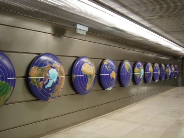 Estación Canyelles, Barcelona, España. Autor Benet Rossell